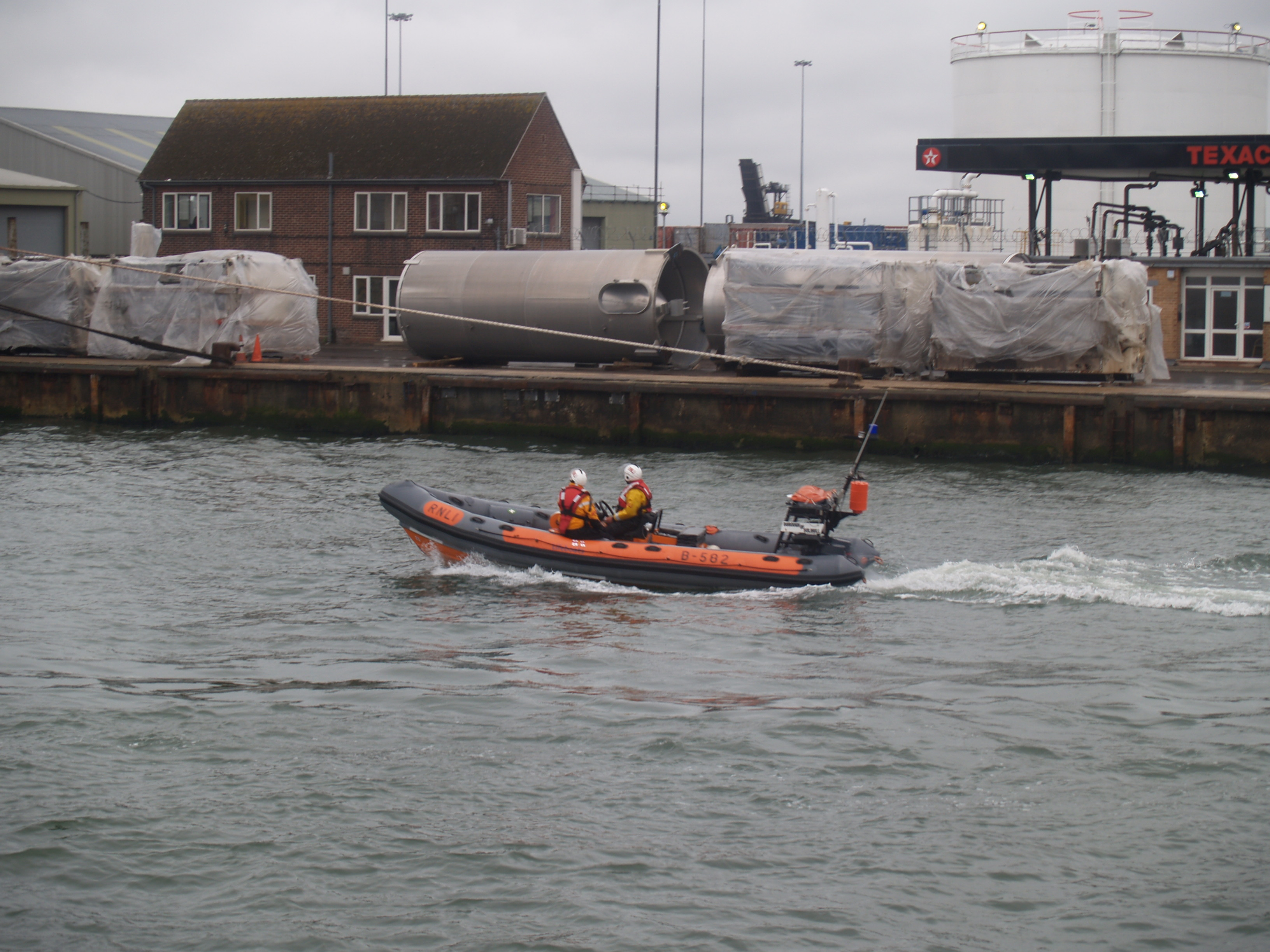 RNLI Lifeboat in Poole Harbour